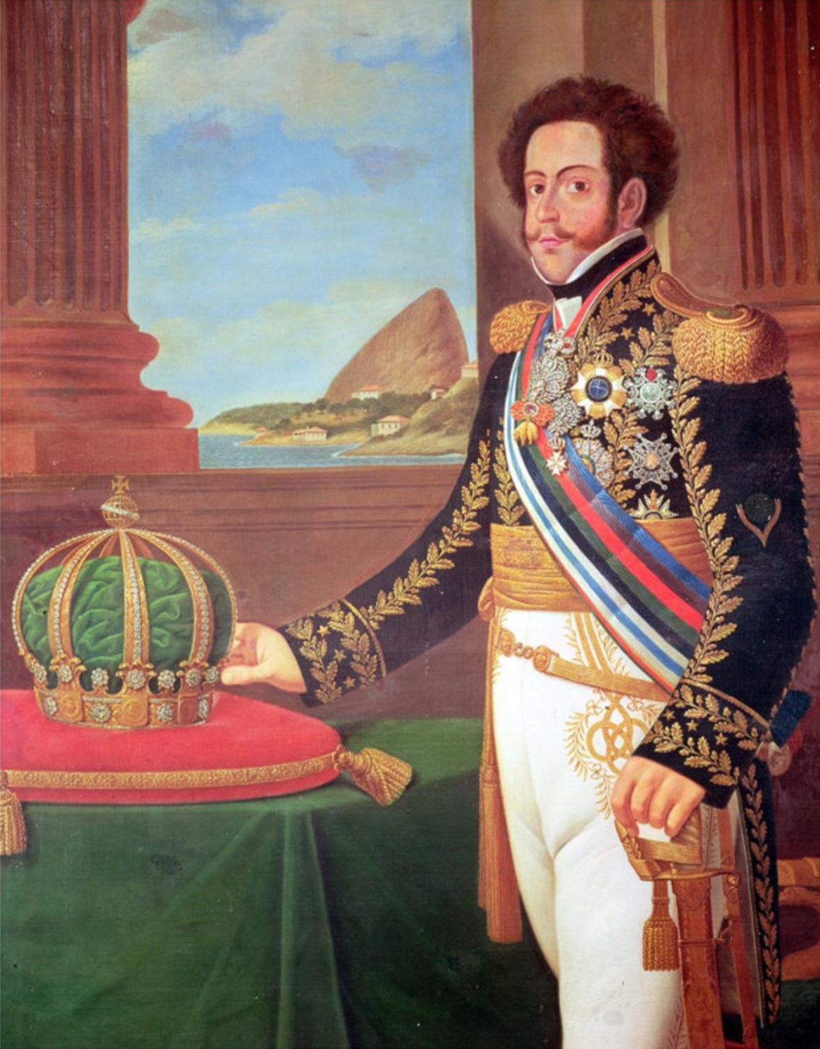 Dom Pedro I, emperor of Brazil.label QS:Len,"Dom Pedro I, emperor of Brazil." label QS:Lpt,"Dom Pedro I, imperador do Brasil."